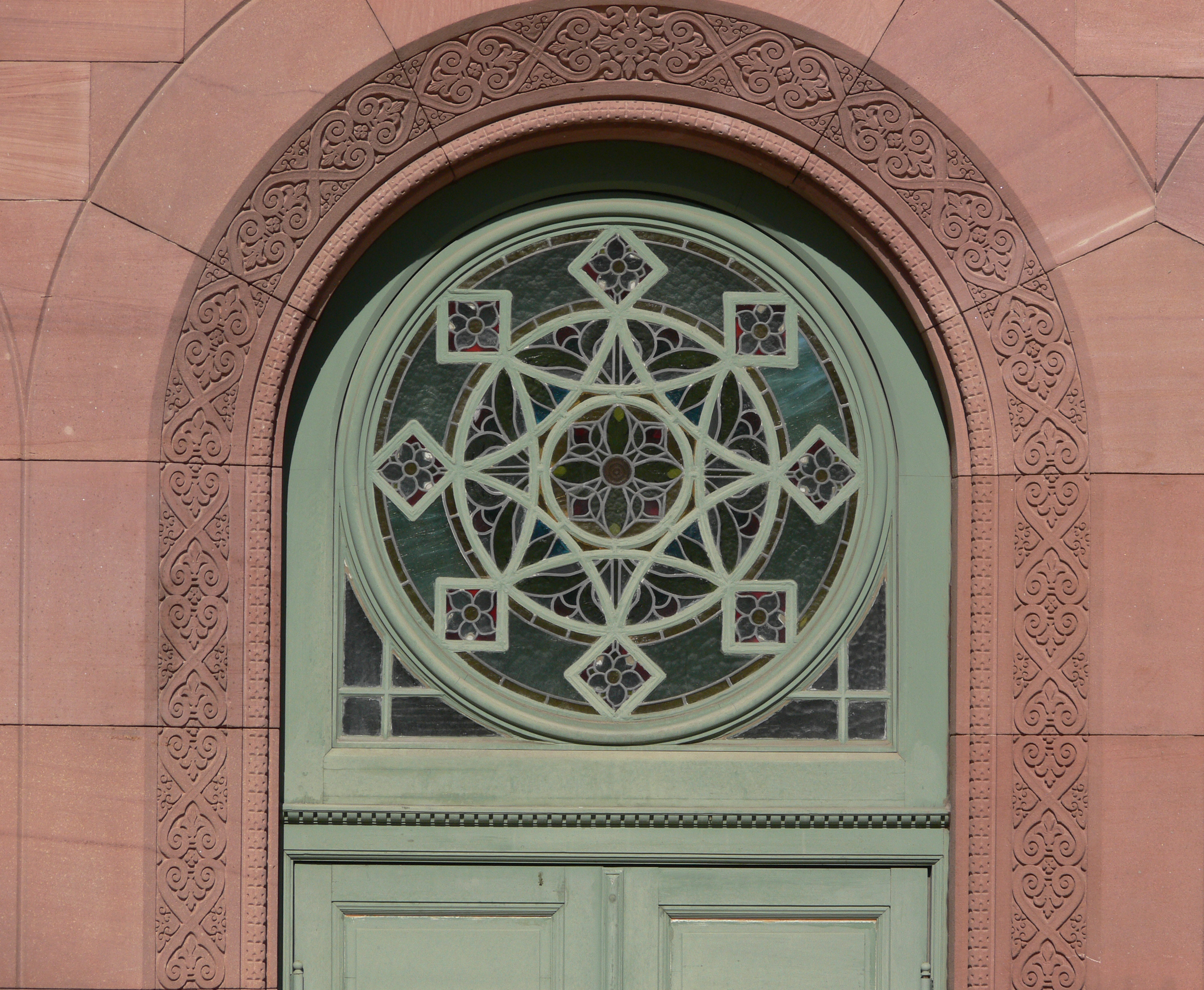 Architekturdetail, Palais Thermal (Graf-Eberhard-Bad), Bad Wildbad